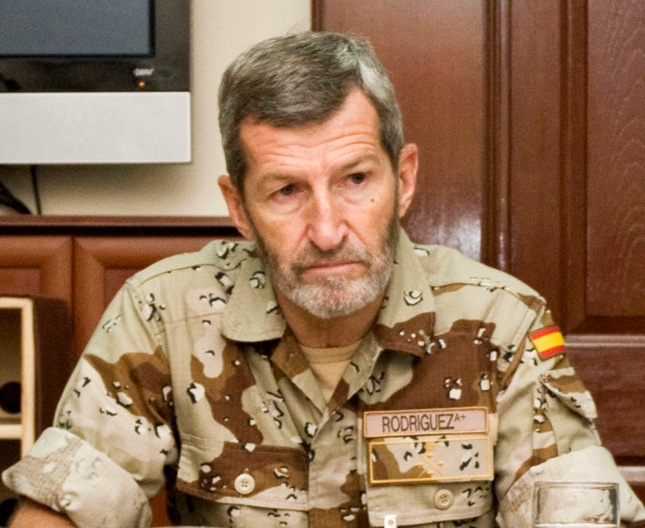 José Julio Rodríguez Fernández, Jefe del Estado Mayor de la Defensa de España, en Kabul, 2009.